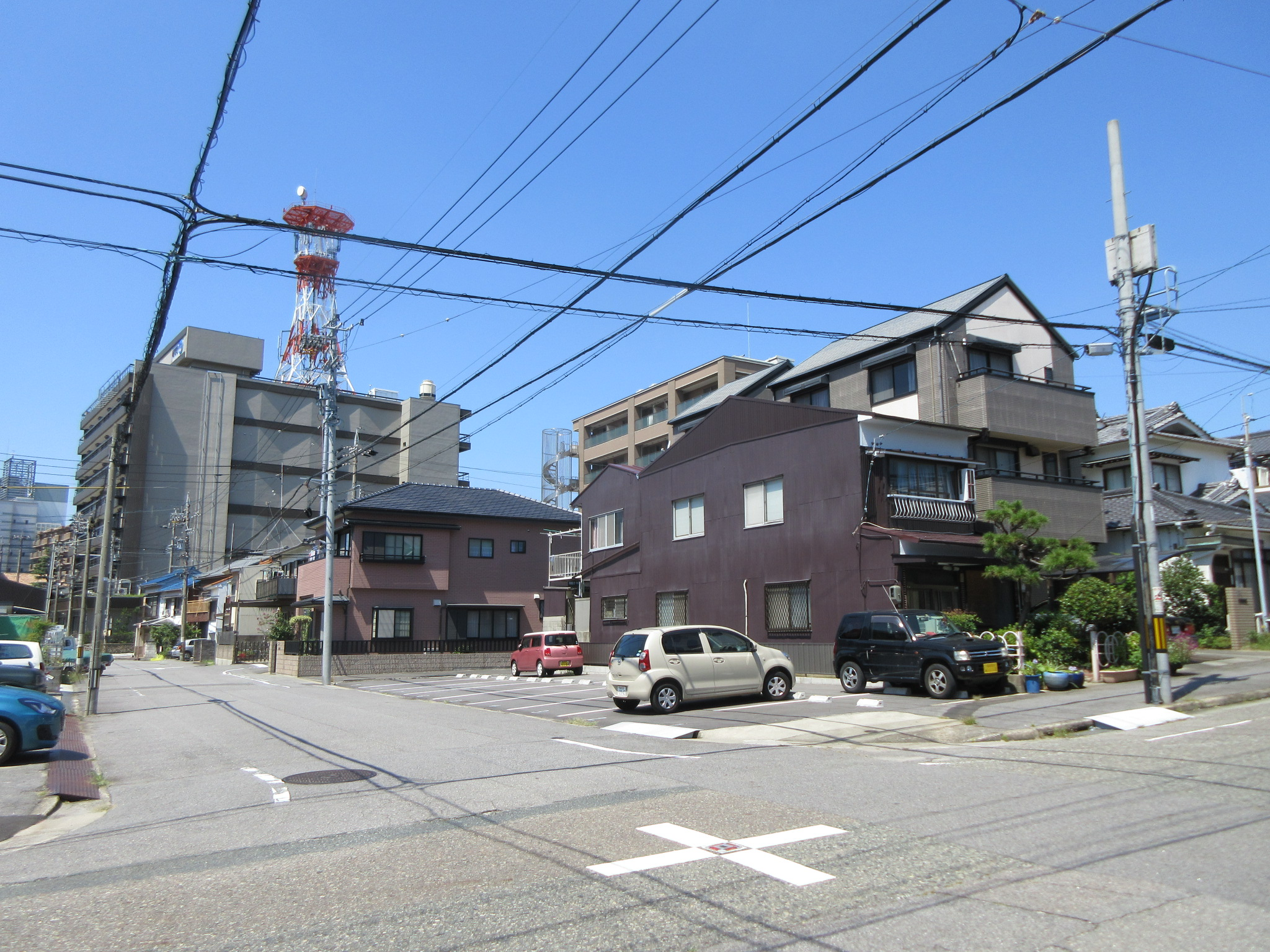 岡崎市六地蔵町